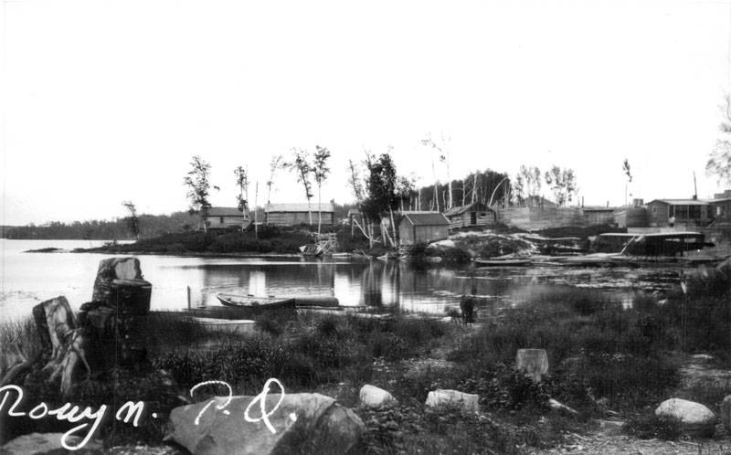 Vue de la pointe Dumulon, sur les berges du lac Osisko, à Rouyn-Noranda. Dès 1924, Jos Dumulon établit son magasin général ainsi qu'un bureau de poste.